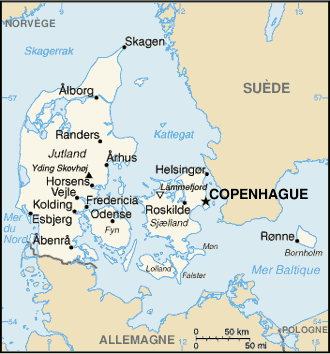 Carte du Danemark